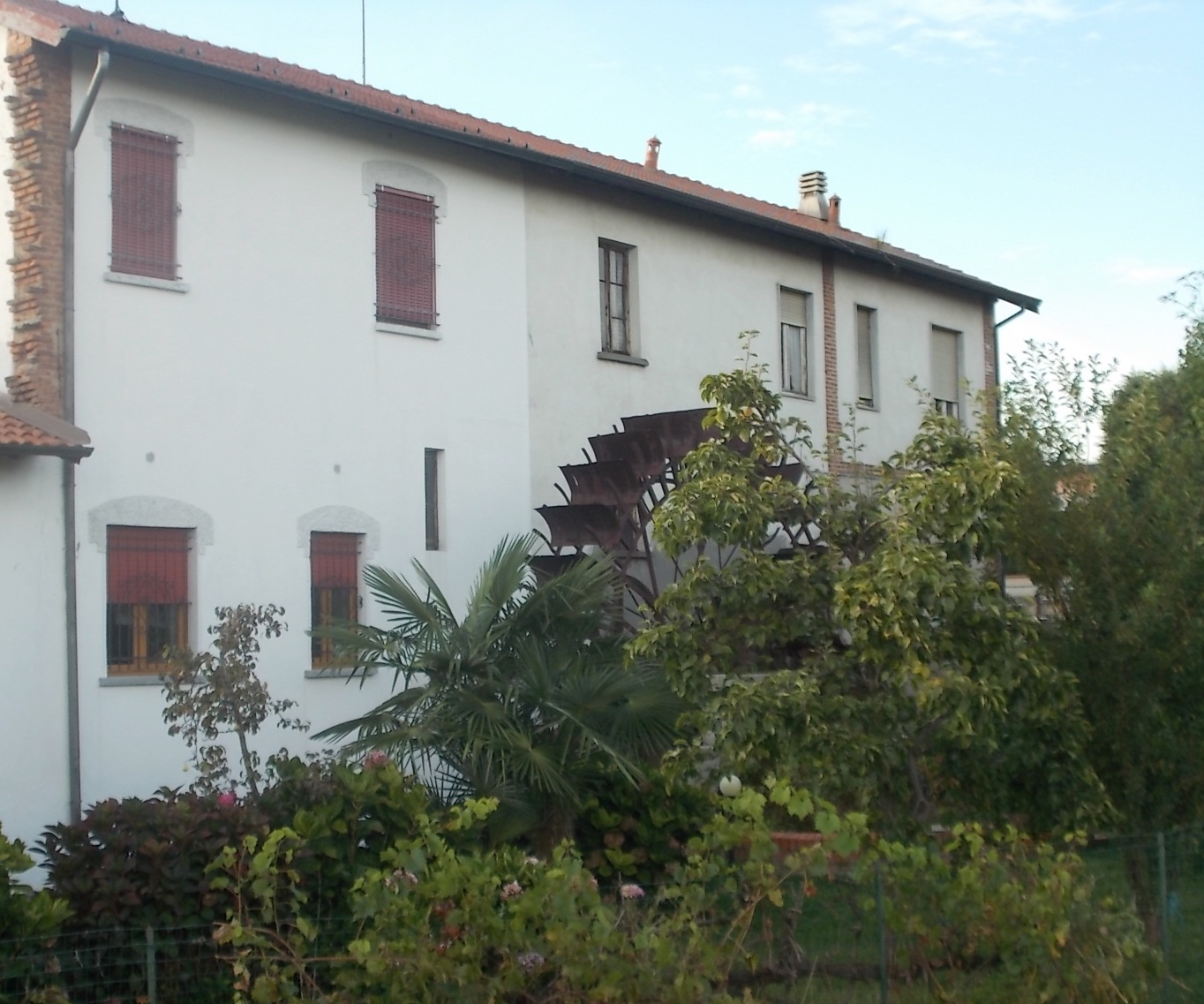 Il mulino Moroni sulla sponda del Canale Villoresi